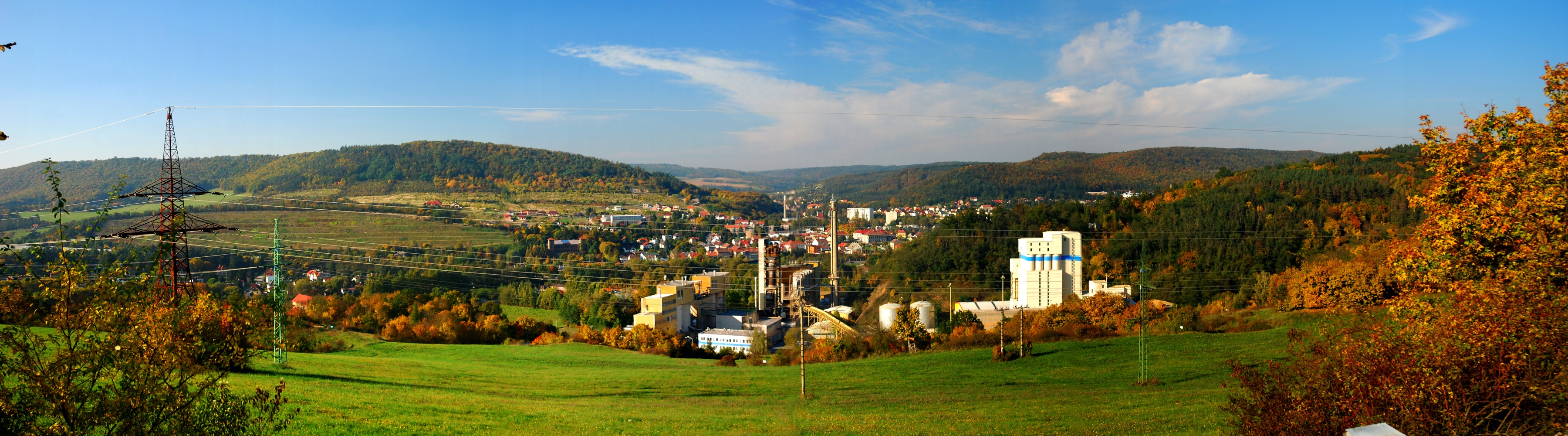 Panorama Loděnice - pohled z jihu.